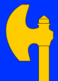 Bárd_(heraldika)